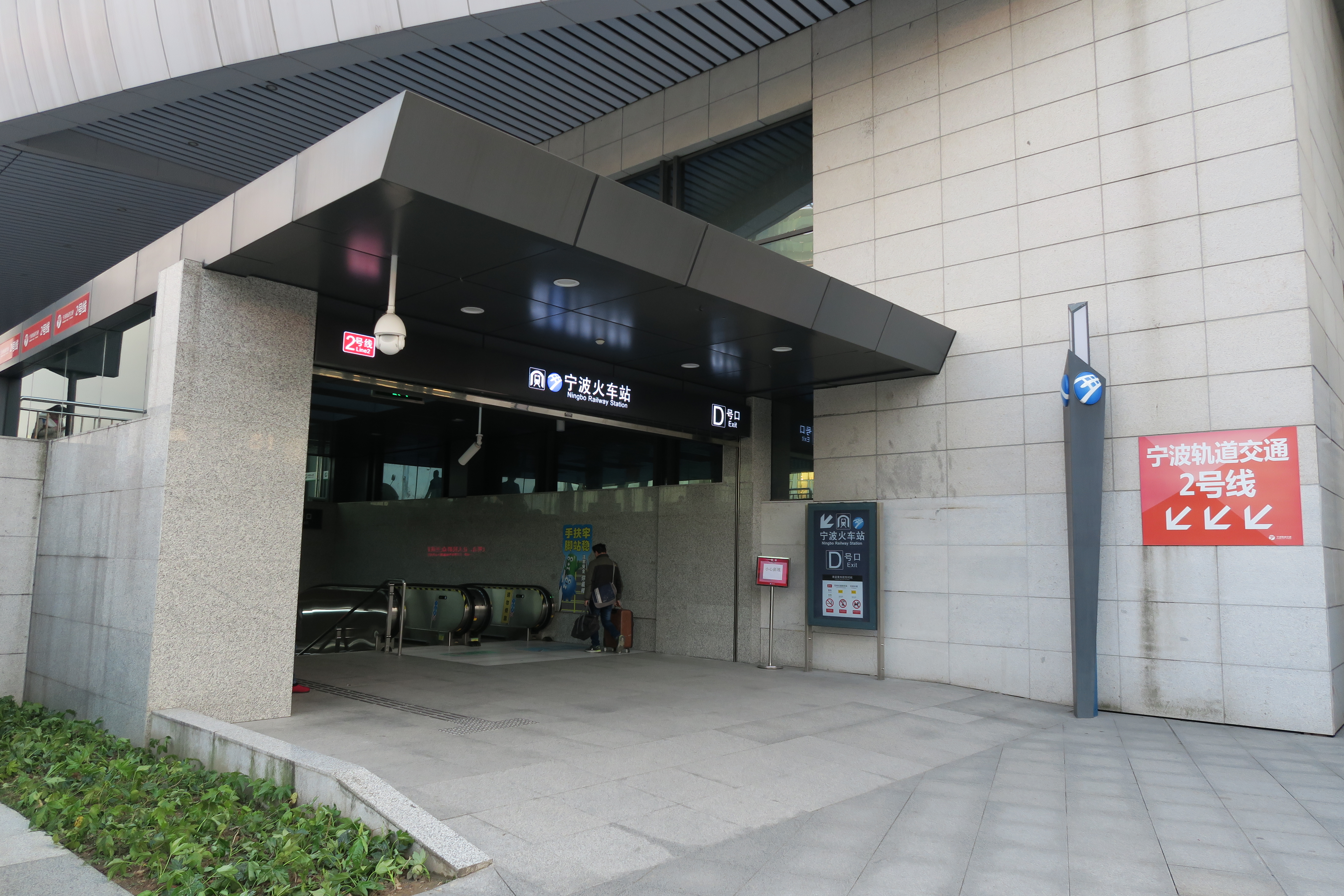 宁波火车站（轨道交通）D口